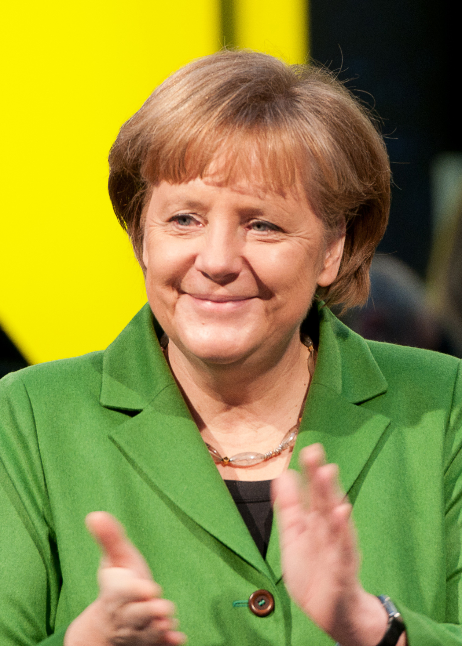 Angela Merkel bei der Eröffnung der CeBIT 2012 CeBIT 20126. bis 11. März in Hannover Dieses Foto wurde durch die Unterstützung von Wikimedia Österreich und die Twoonix Software GmbH ermöglicht.